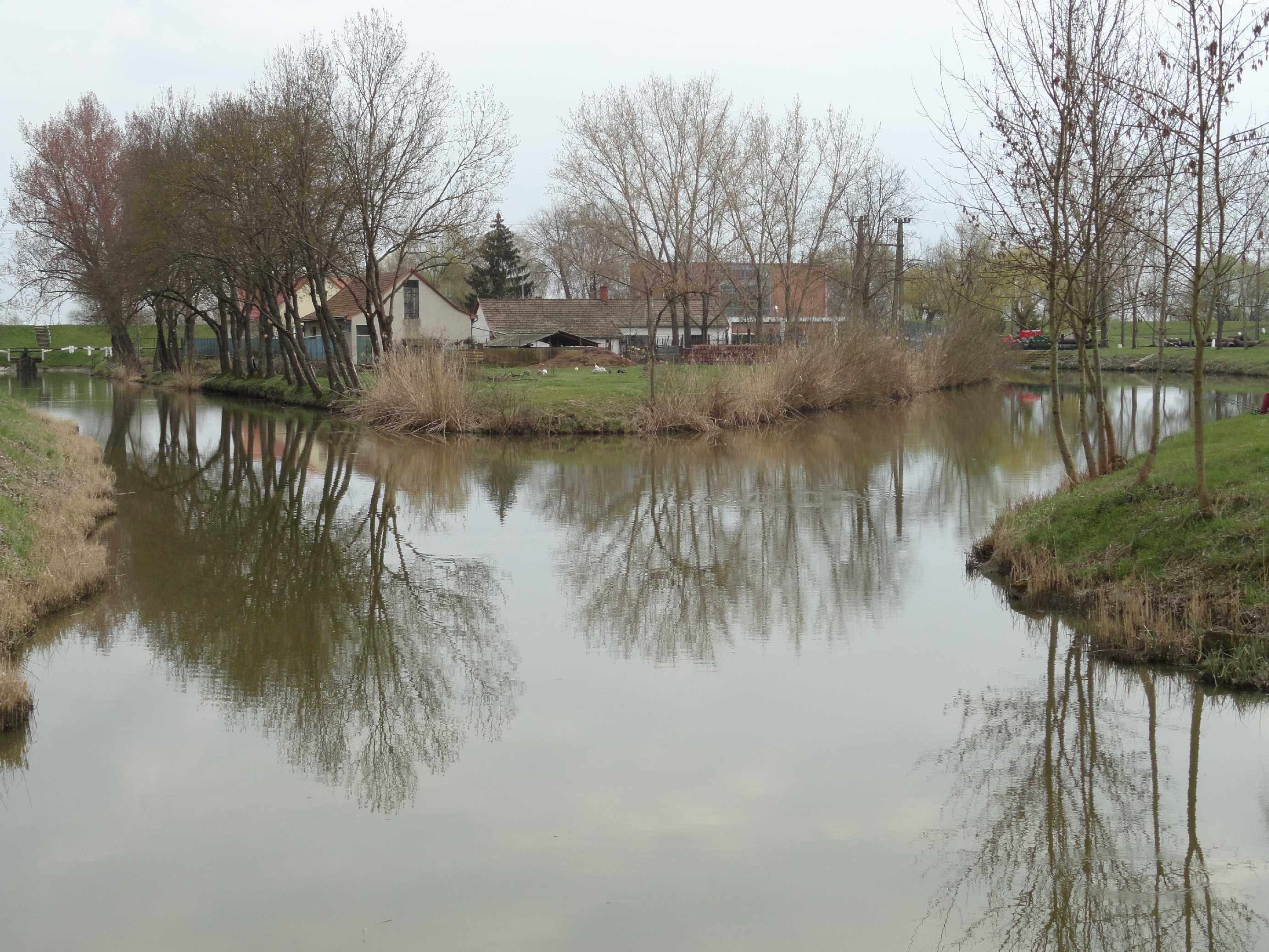 Szép táj